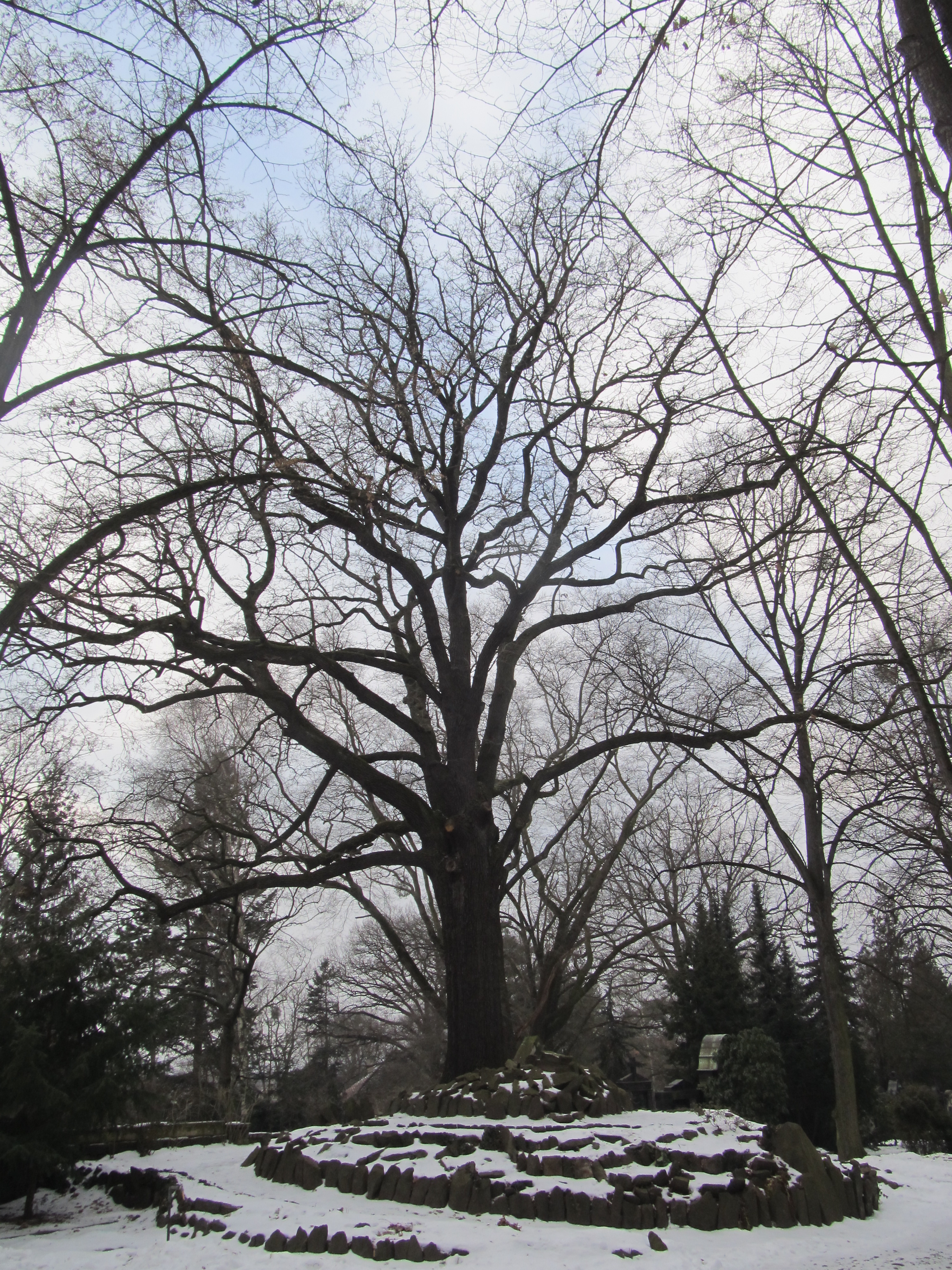 Marschalleiche auf dem St.-Pauli-Friedhof in Dresden